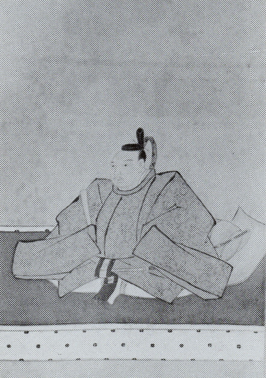 相良長寛の肖像(モノクロ)。